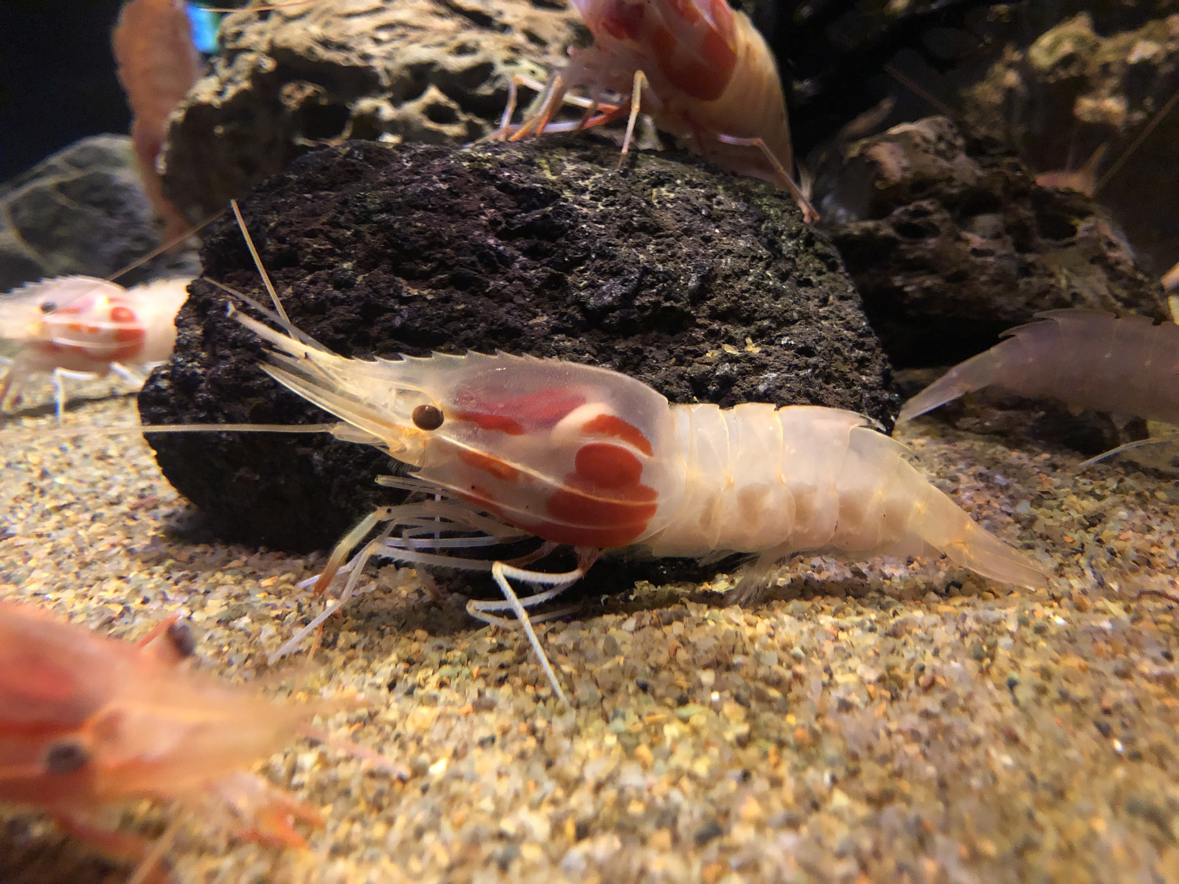 ミノエビ(Heterocarpus Hayashii)。沼津港深海水族館飼育個体。